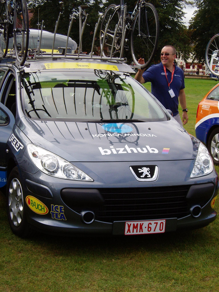 Konica-Minolta (wielerploeg)